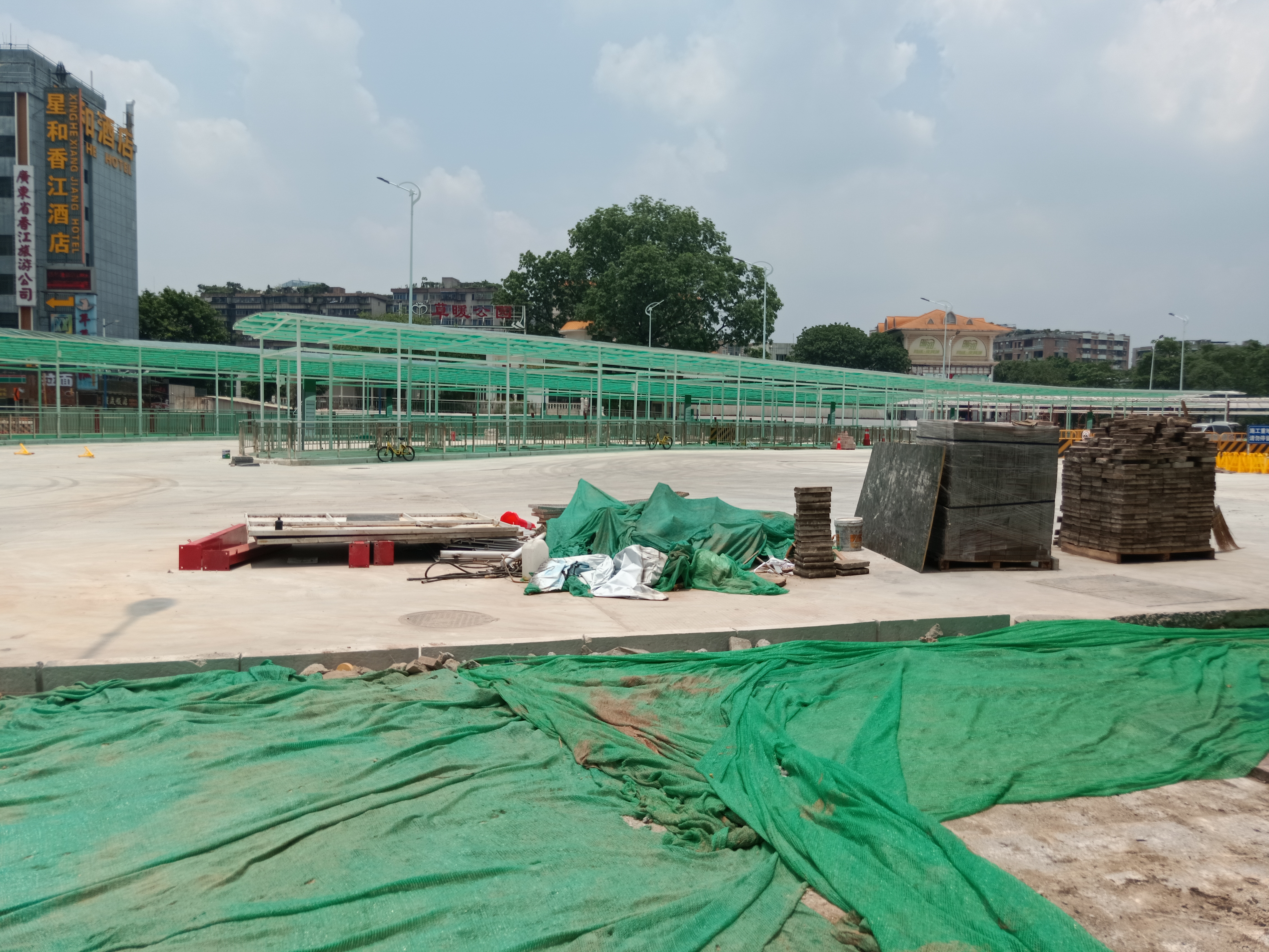 粵語: 2018年6月17號，原先草暖公園站嘅地皮已經挖成巴士總站。